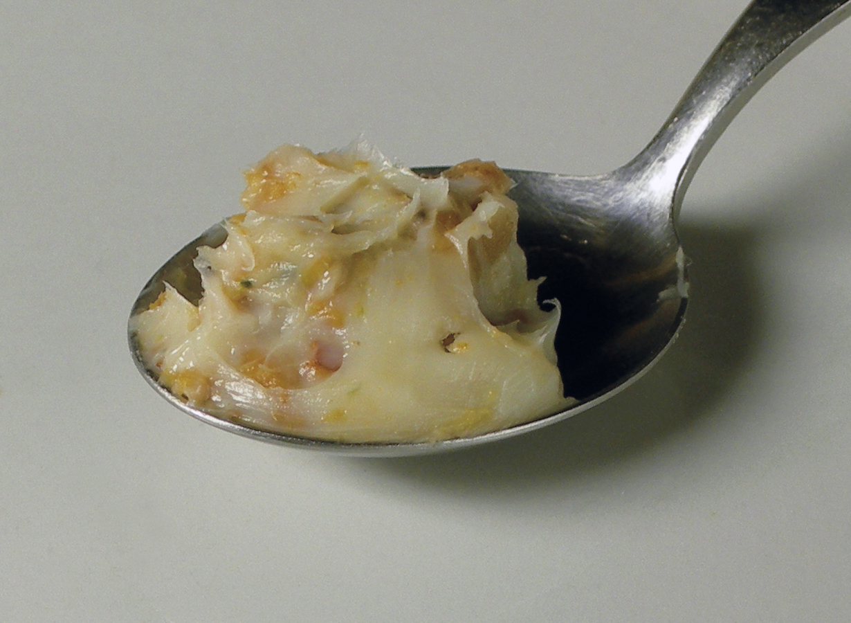 Griebenschmalz